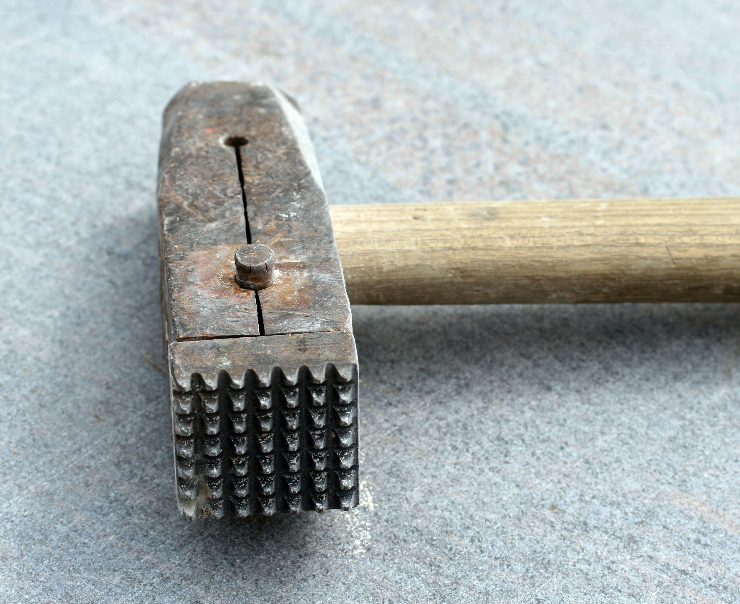 Stockhammer